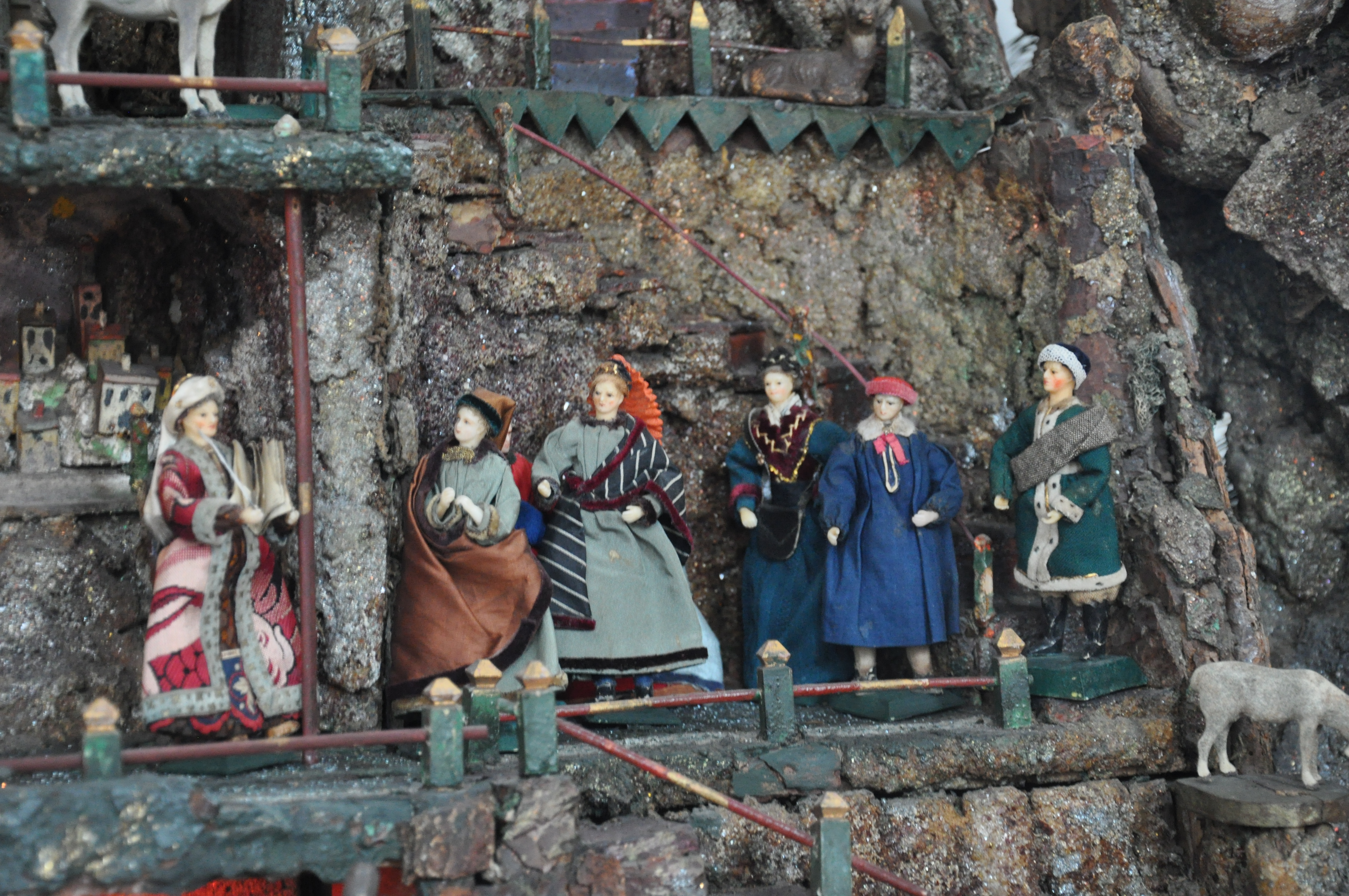 Wangen im Allgäu, Spitalkirche Heilig Geist, Simultankrippe (Krippenberg um 1890, Figuren wohl hauptsächlich 2. Hälfte 19. Jh. von Vinzentinerinnen gefertigt, renoviert 2002), Volkszählung zu Bethlehem